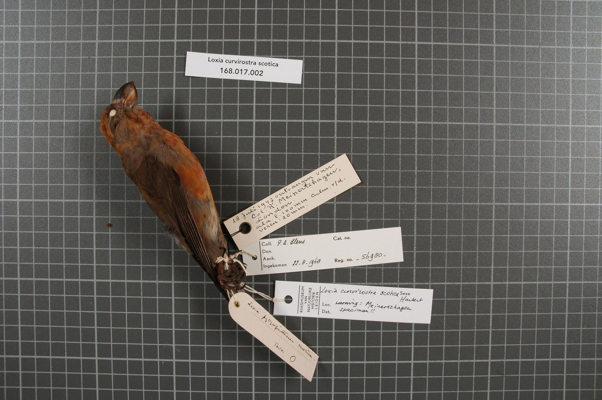 Loxia curvirostra scotica Hartert, 1904